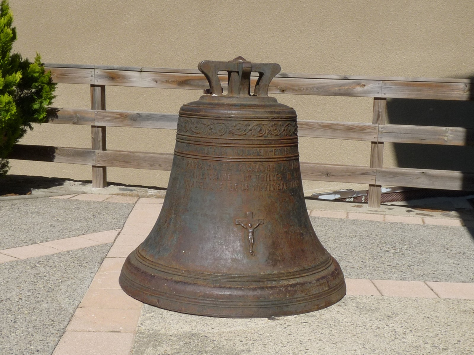 Cloche au pied de l'église de Matemale, Pyrénées-Orientales, France